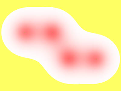 Bindendes π-Orbital des Butadien andere Versionen